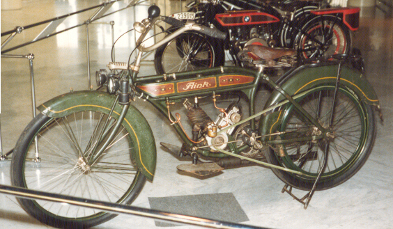 Flink-BMW con motore Kurier monocilindrico da 148cc del 1920 - Eigen foto Piero